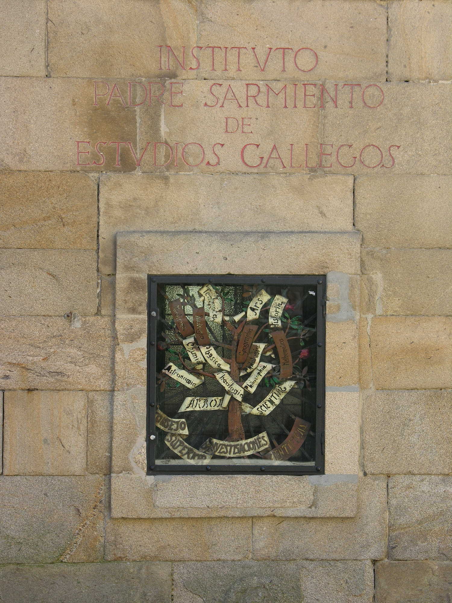 self made. Santiago de Compostela, Galicia, Spain.